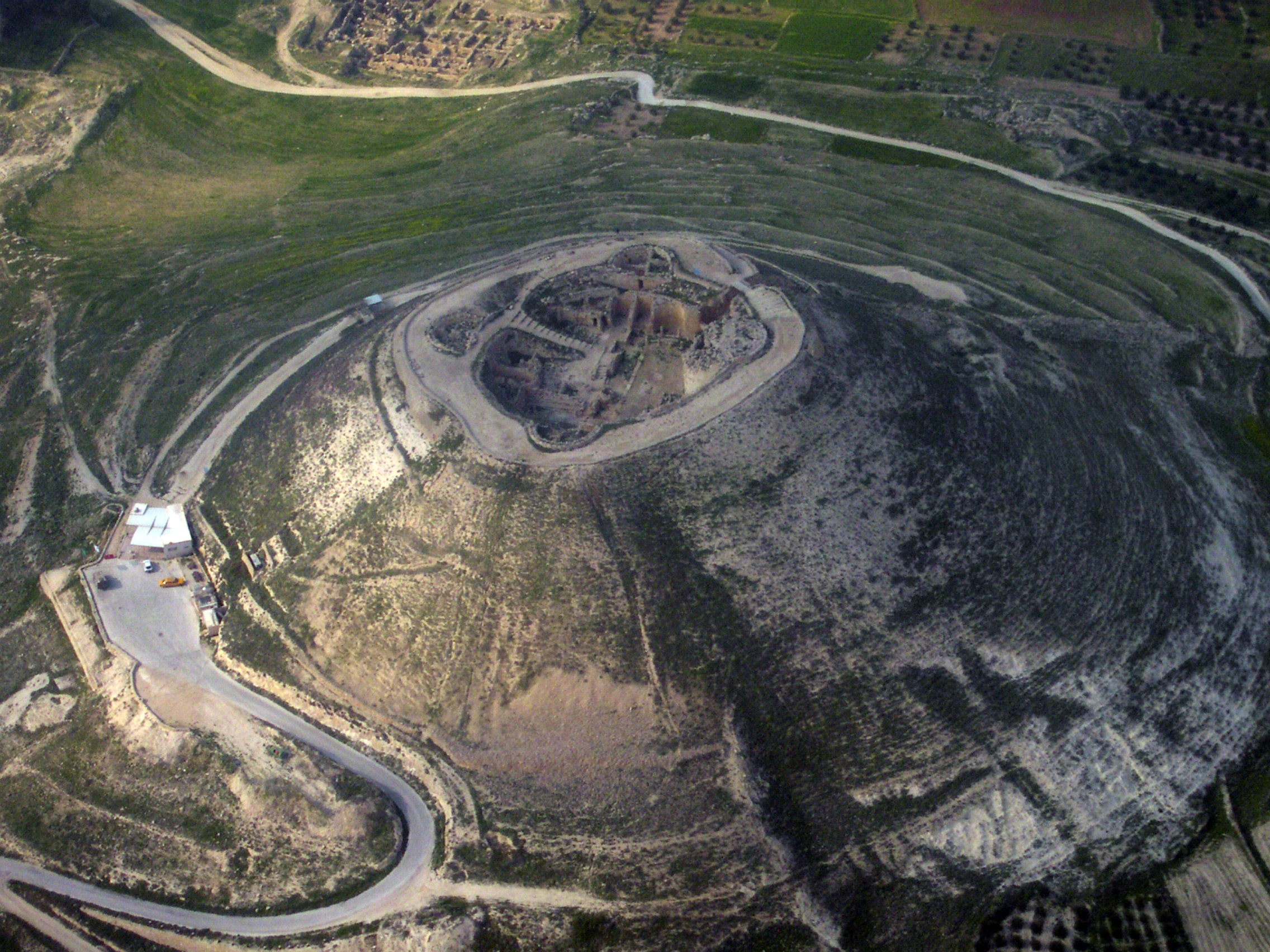 Herodium